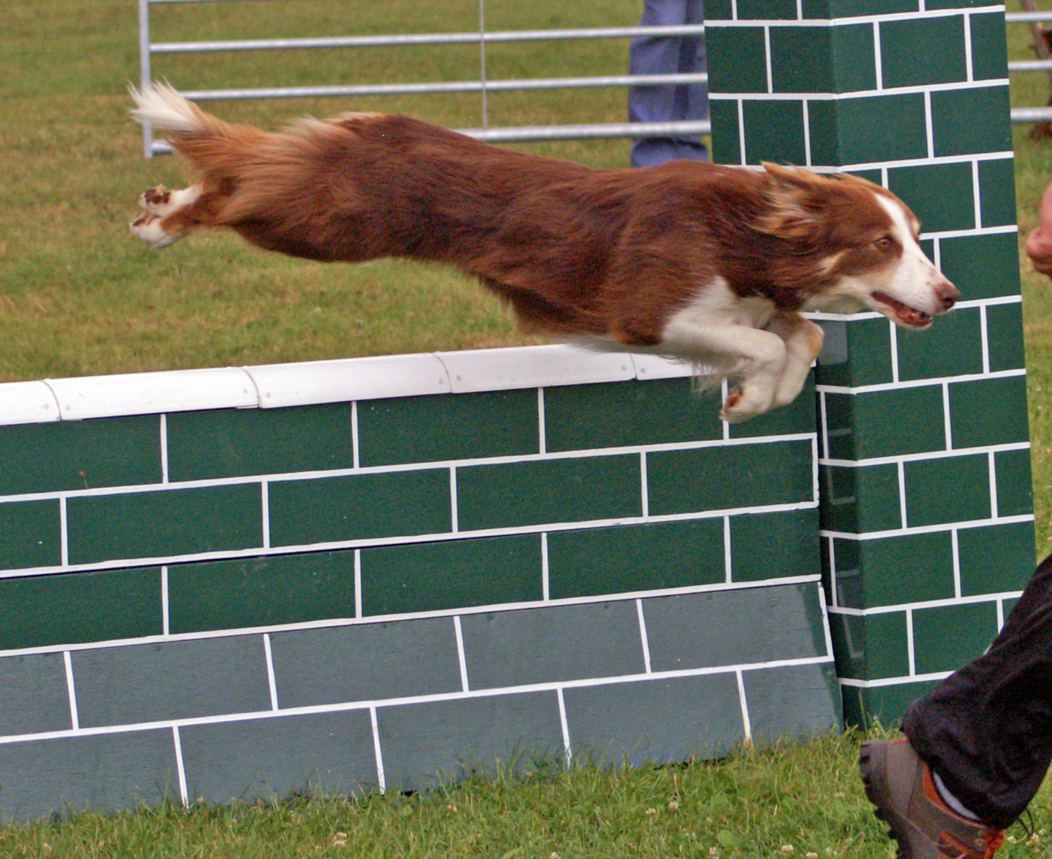 Dog Agility Class